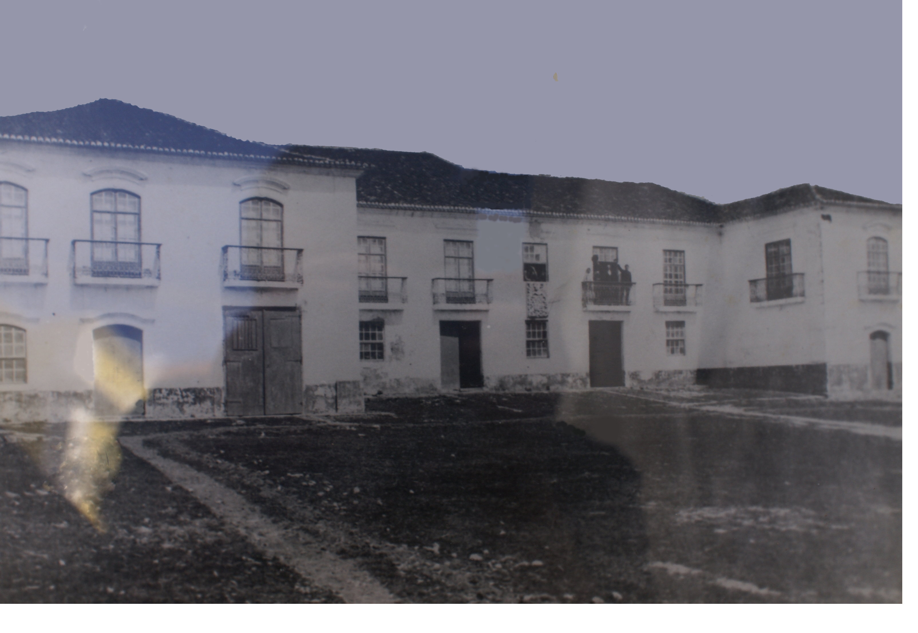 Solar de Santa Luzia, Angra do Heroísmo, ilha Terceira, Açores, Portugal